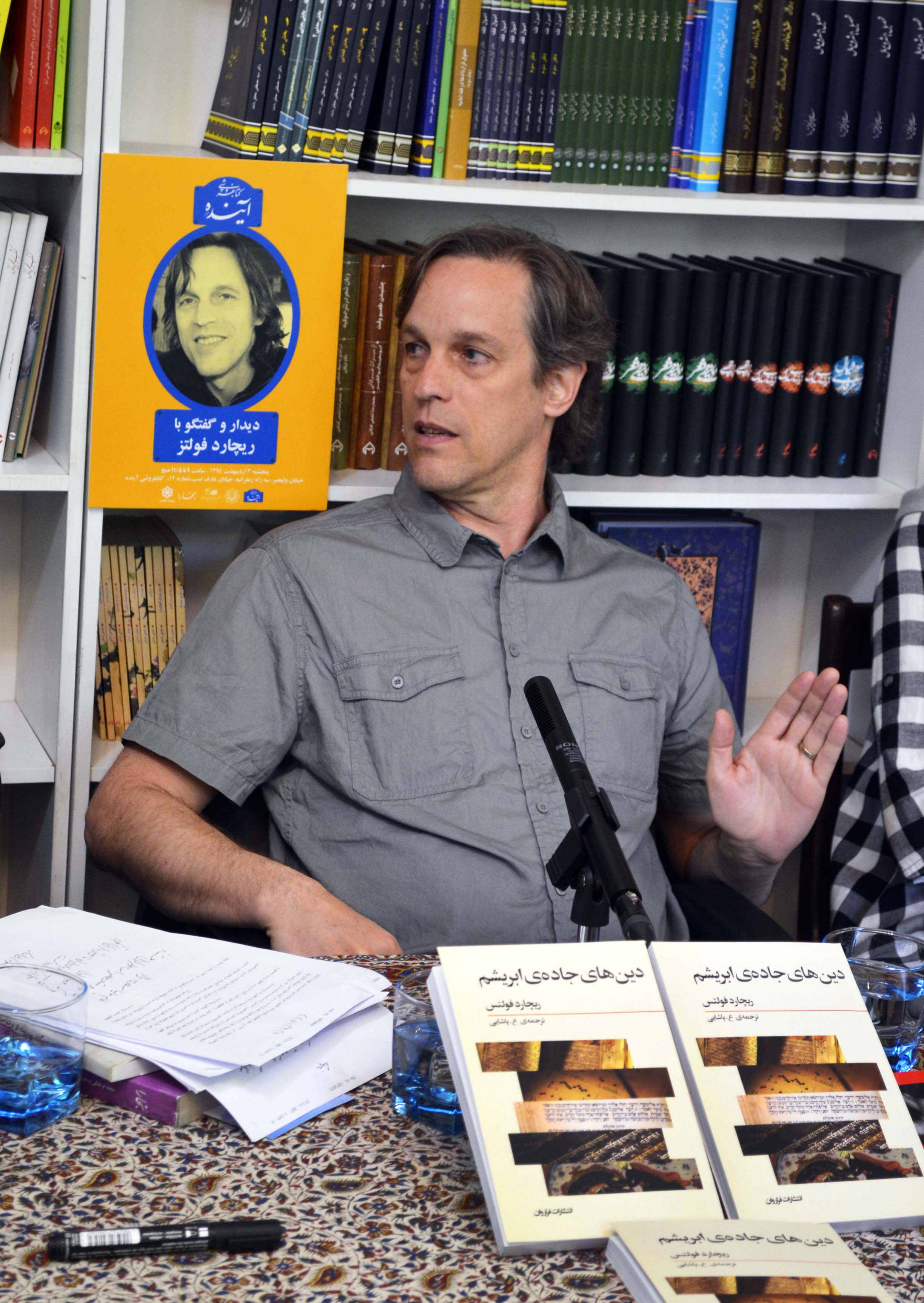 دکتر ریچارد فولتز